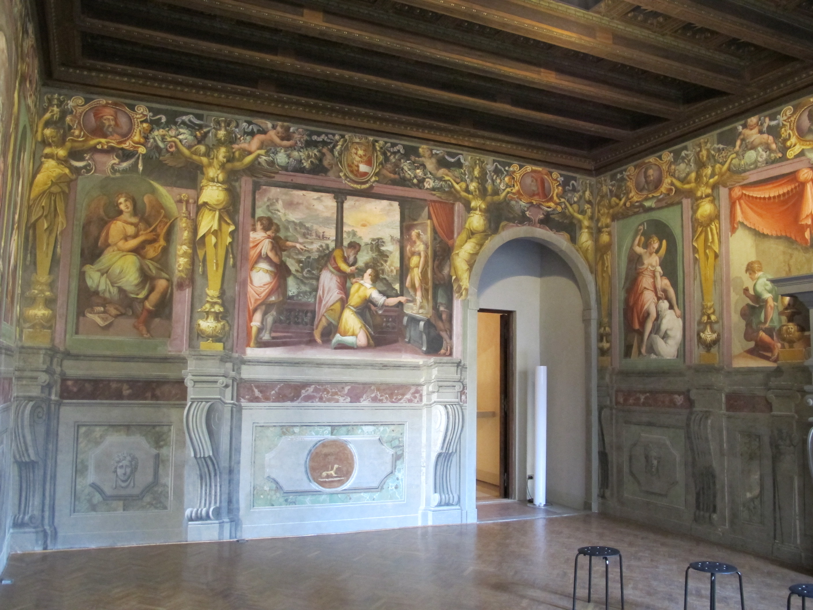 Casa vasari FI, salone, parete